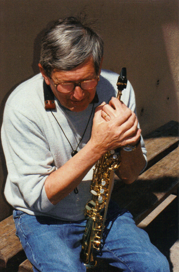 En pleine répétition